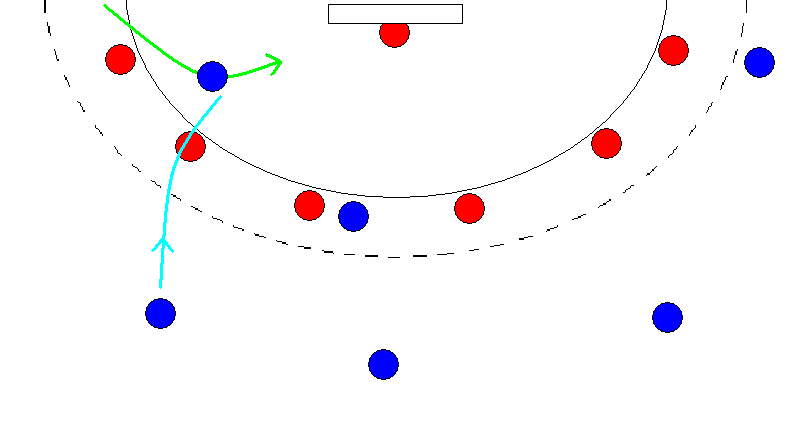 En så kallad "japanare" i handboll. Spelare passar över motståndare till medspelare som fångar bollen i luften och sen skjuter.